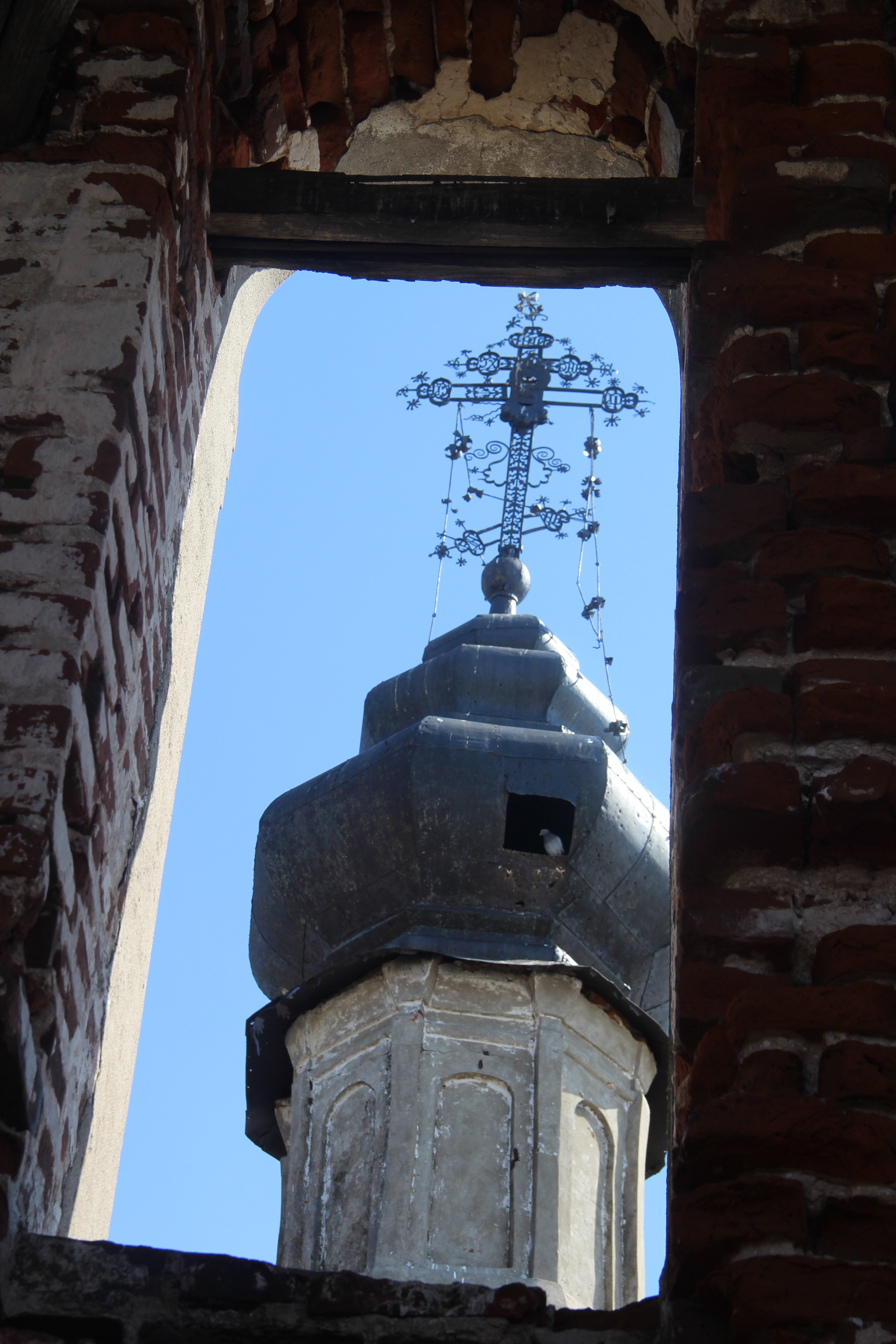 Вид из окна колокольни. Купол Христо-Рождественской церкви. Шуран. Лаишевский р-н. РТ. Апрель 2014